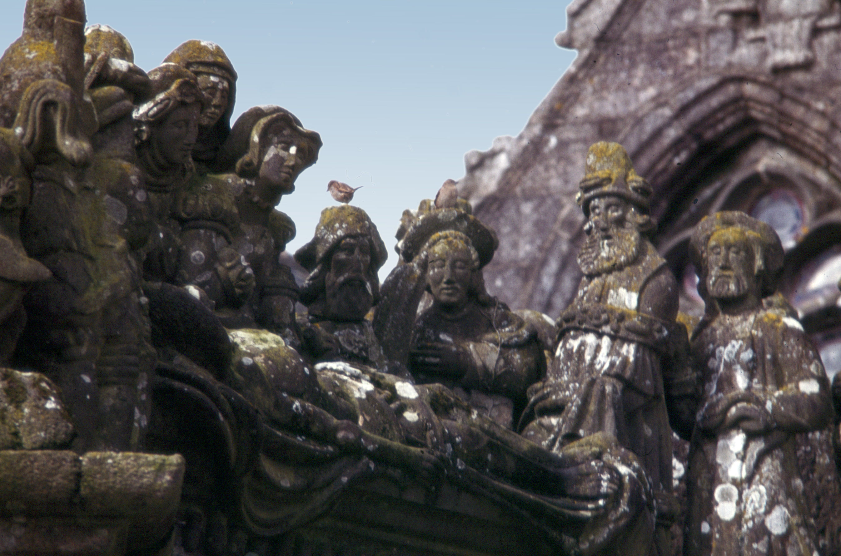 Guimiliau